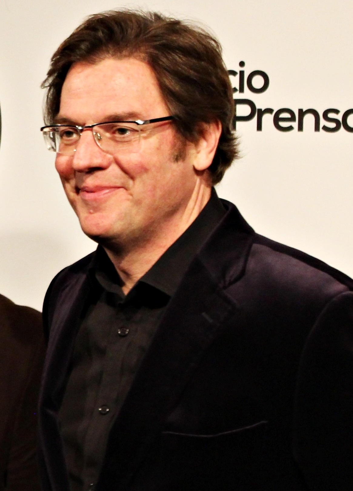 Detalle de una fotografía mayor en la que aparece el productor de cine español Álvaro Longoria en la 74 edición de las Medallas del Círculo de Escritores Cinematográficos en la que competía su película Campeones.